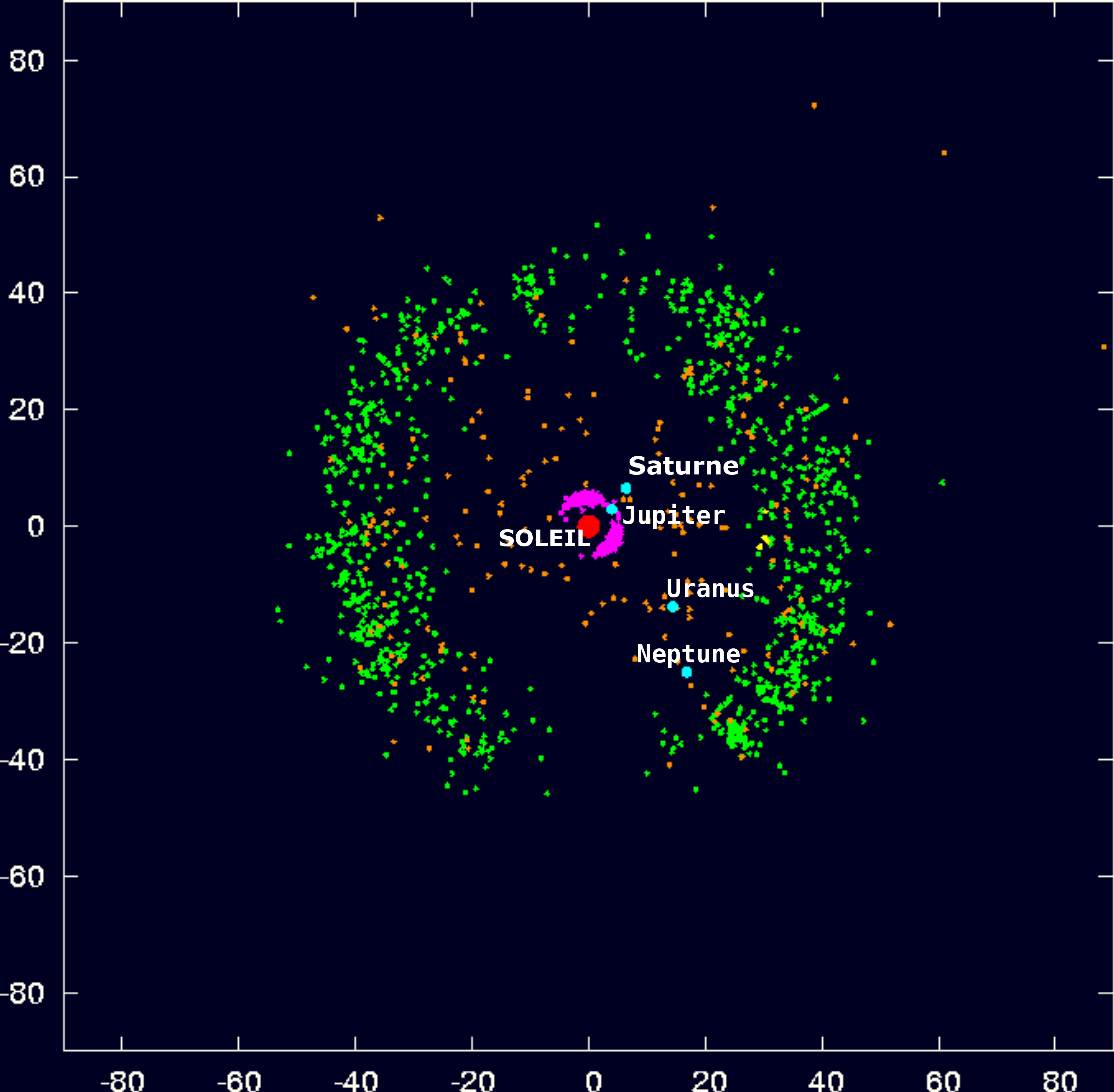 Les « rayons » radiaux de densité plus élevée de cette image, ou les lacunes dans des directions particulières, sont dus au biais d'observation (lieux où l'on a recherché des objets) plutôt qu'à une quelconque structure physique réelle.